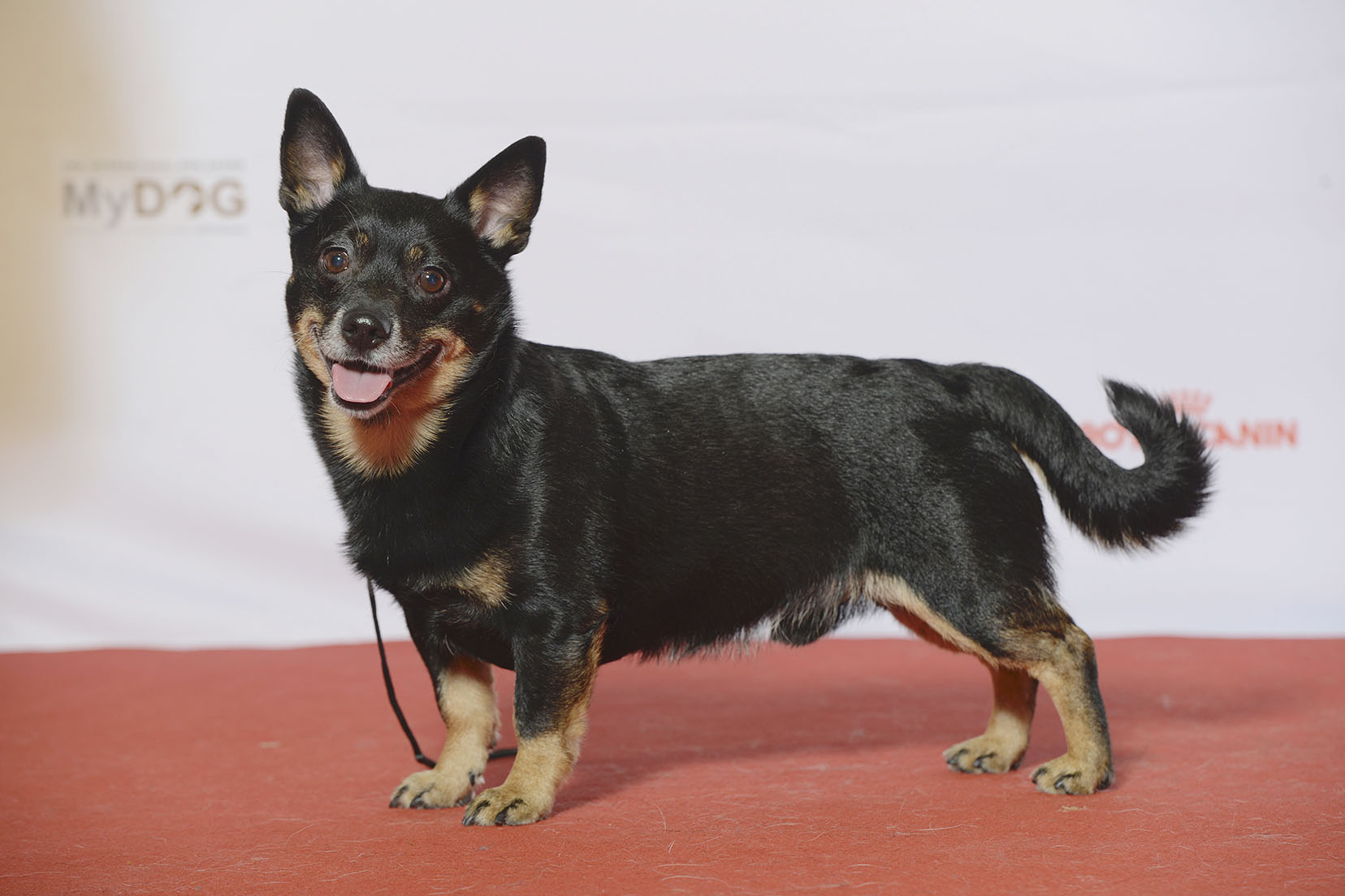 Grupp 1, LANCASHIRE HEELER, NO UCH NO V-14 NO V-15 SE UCH Ståhlskyttens Longed For Antony MyDOG, nordens största hundevenemang.